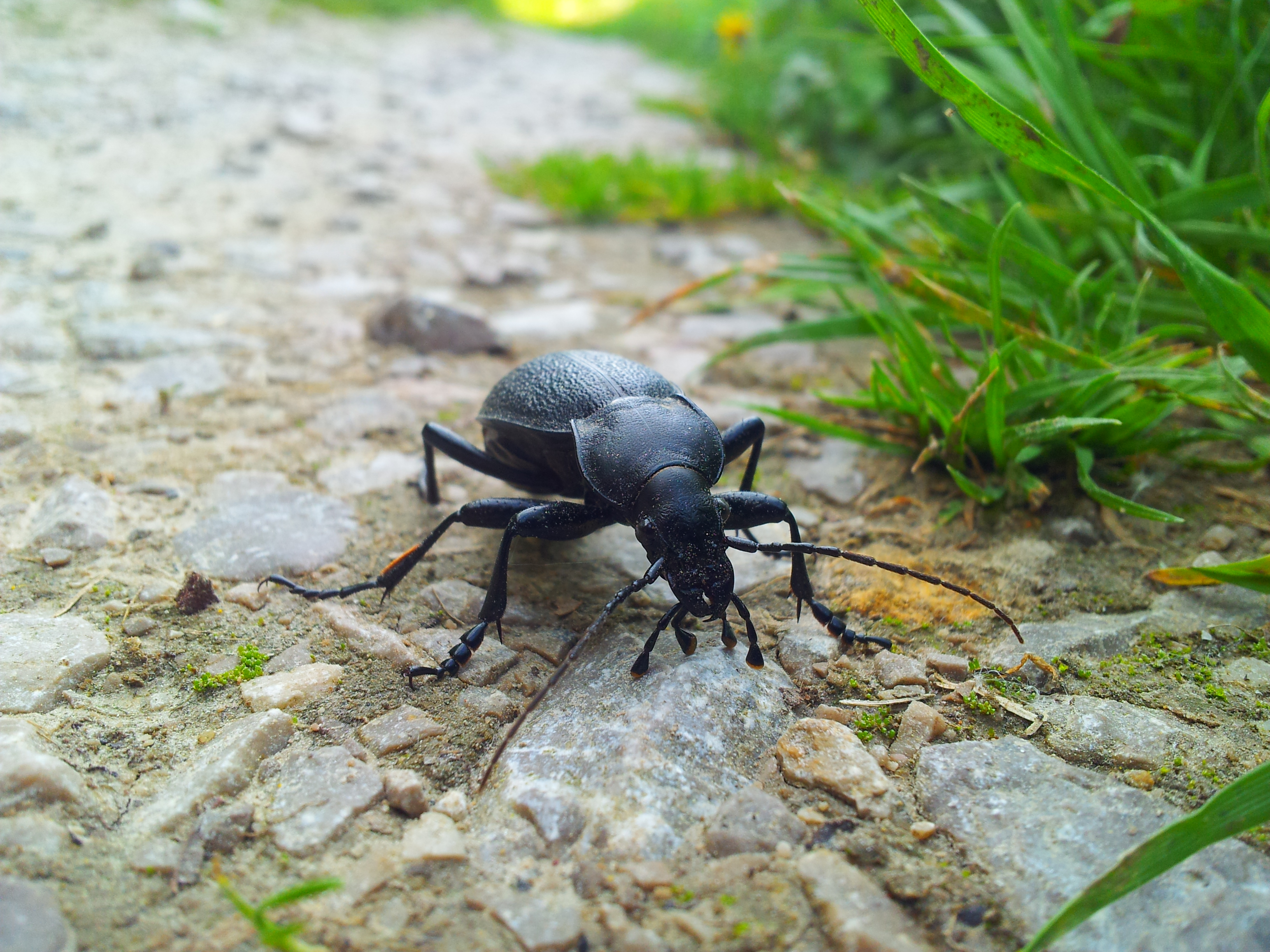 Chrząszcz Biegacz skórzastyLatina: Carabus (Procrustes) coriaceus